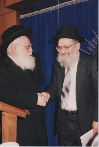 הרב משה צבי נריה